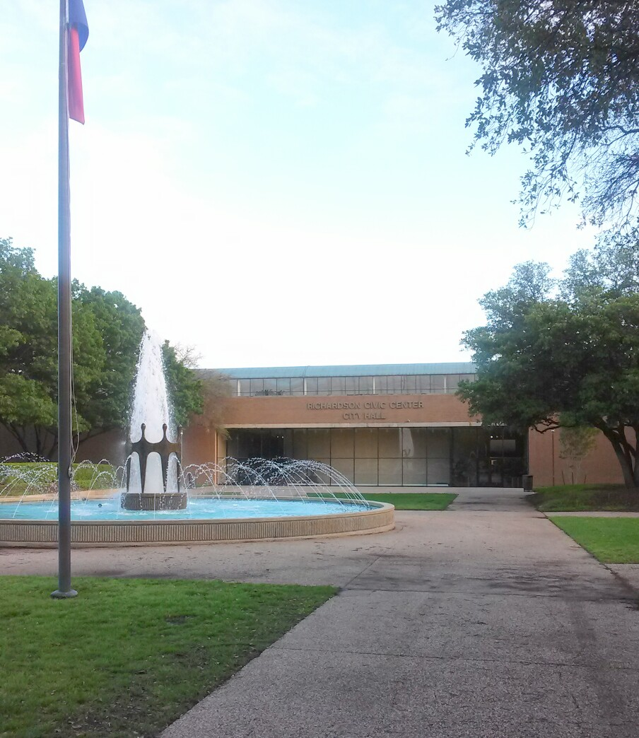 Centro Cívico de Richardson, en Dallas. En su interior se encuentra la Cámara de Comercio de Richardson, el Ayuntamiento y otros servicios.